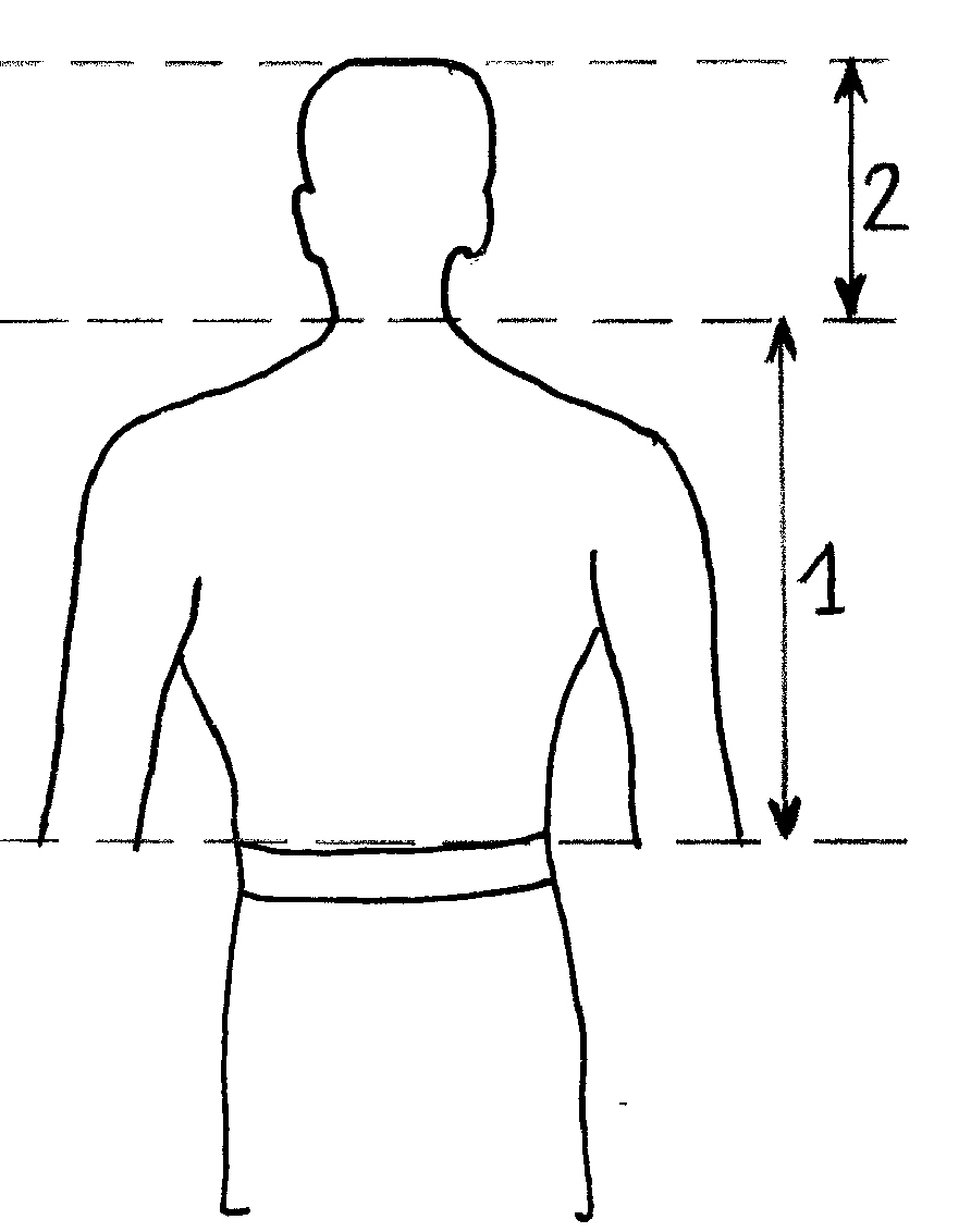 hauteur_cibles.jpg